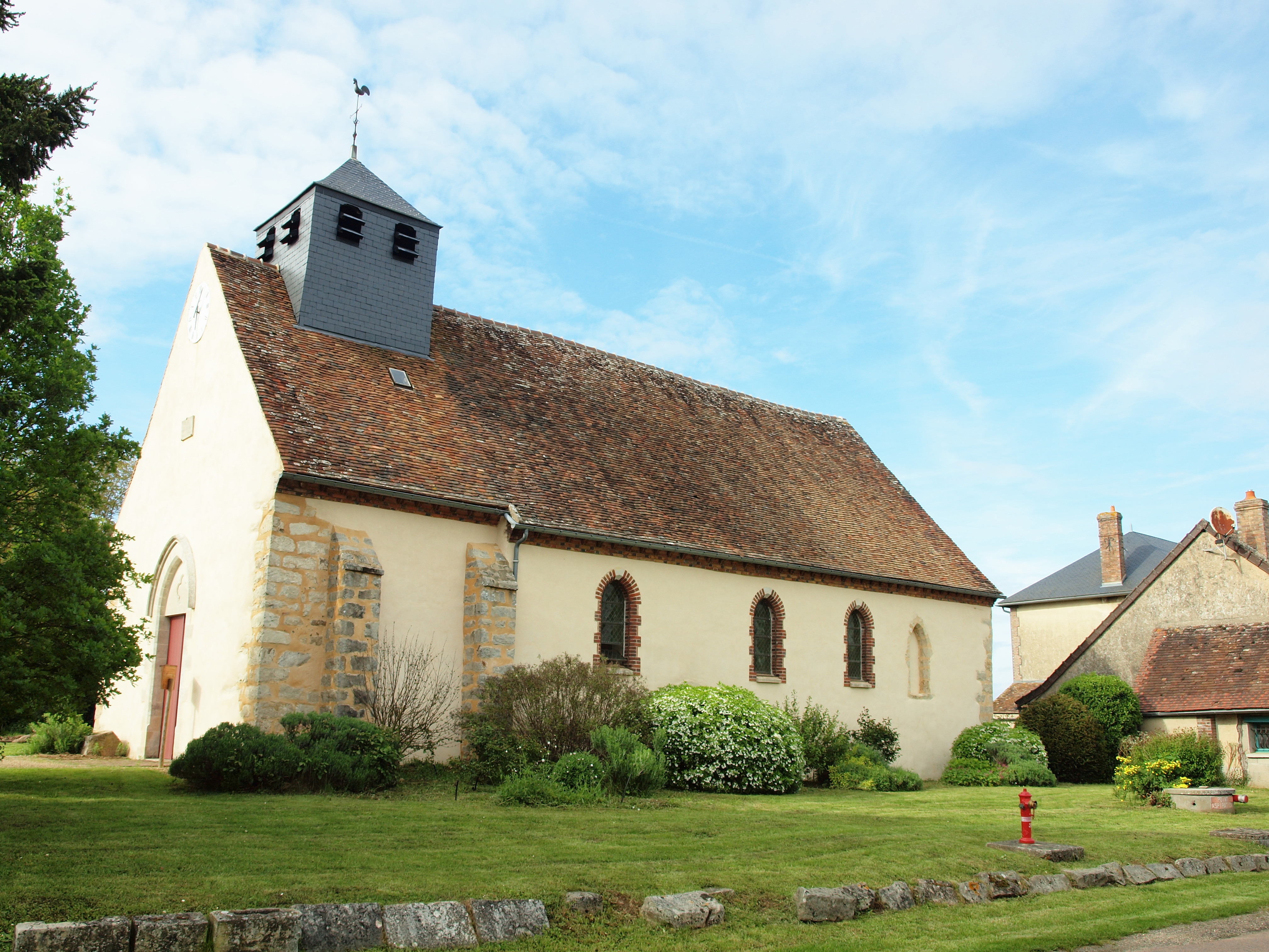 Église Notre-Dame de Cornant (Yonne, France)